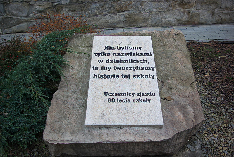 II LO Sanok tablica na kamieniu ufundowana w 1968 (70 rocznica powstania szkoły)